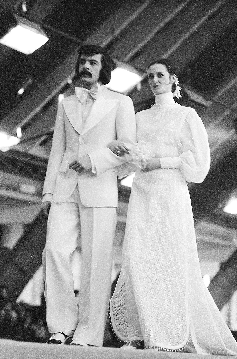 1974 Mood Kalevi Spordihallis. Mati Sõstar ja Faime Jurno